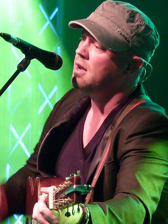 Ryan Sheridan auf der "Music meets Media" in Berlin